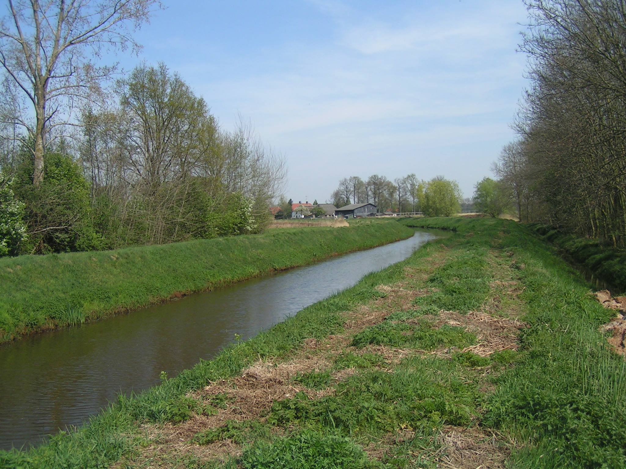 rivier Leijgraaf